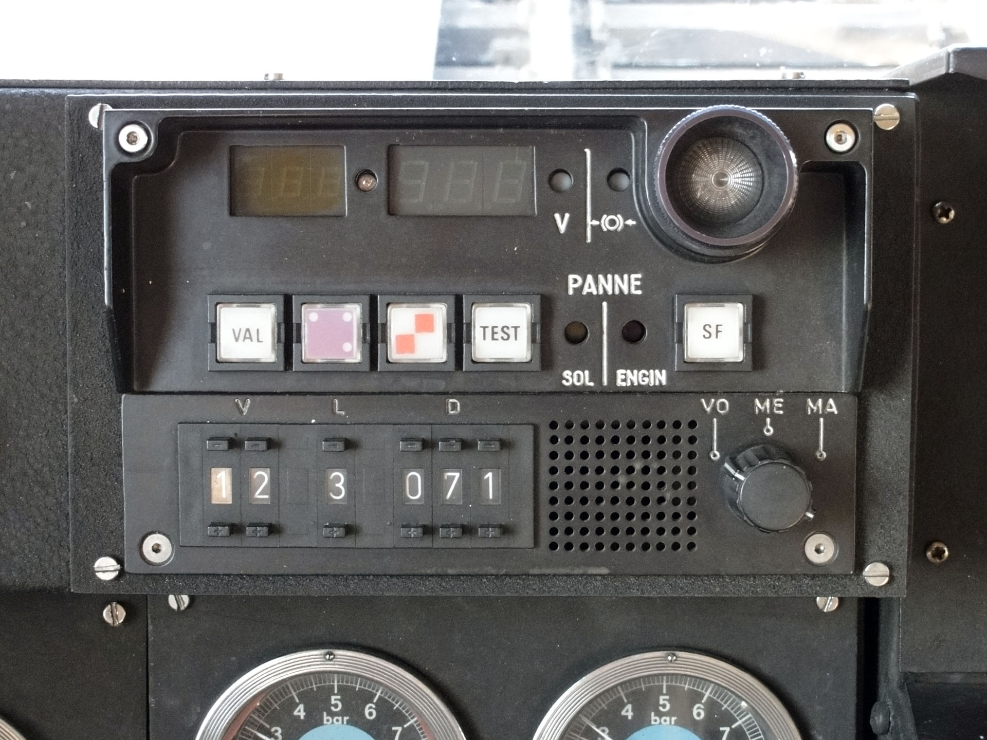 KVB sur le pupitre de conduite d'une rame inox de banlieue au technicentre Paris Nord-Joncherolles, Villetaneuse, Seine-Saint-Denis, France.